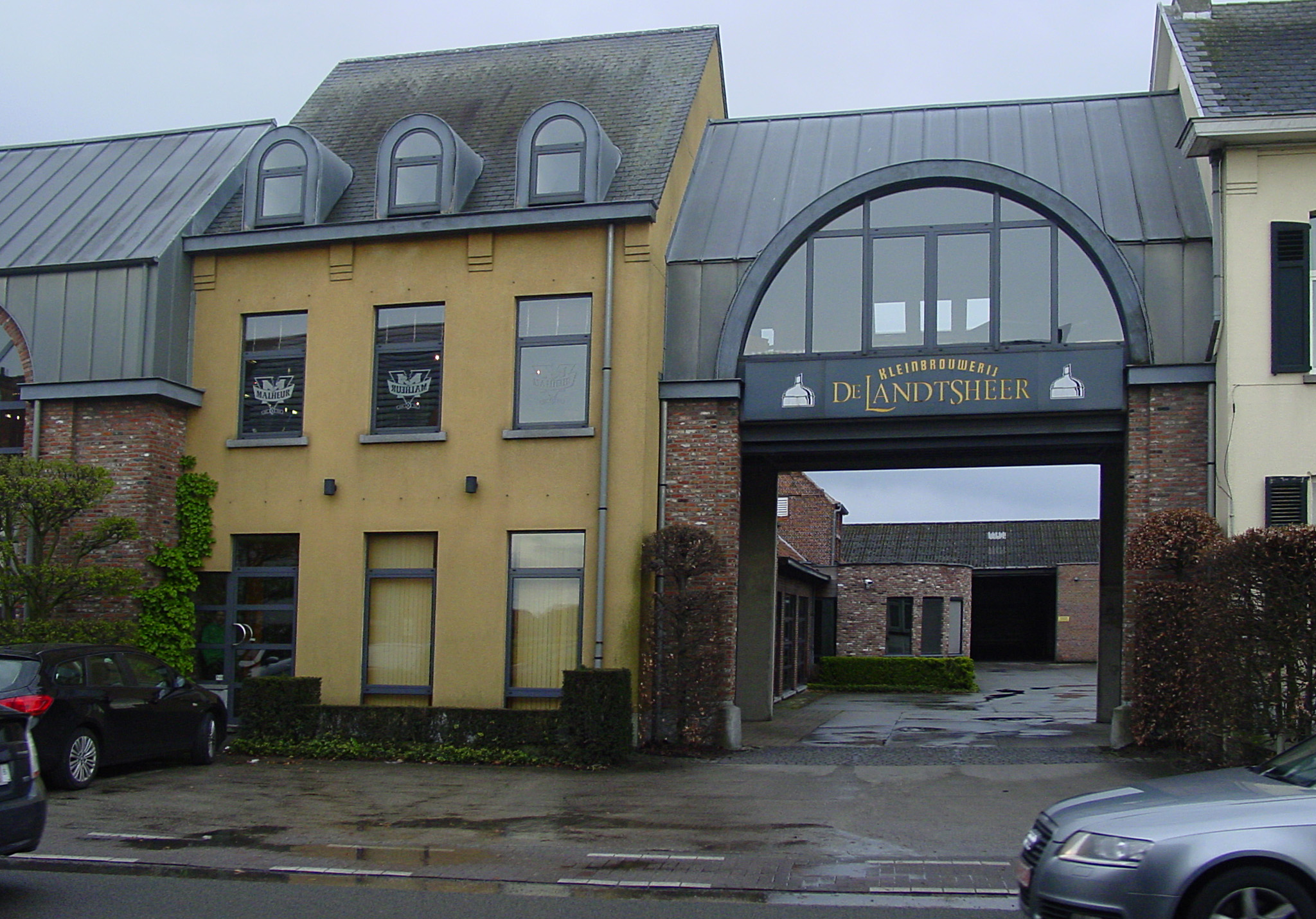 Brouwerij Malheur, Buggenhout